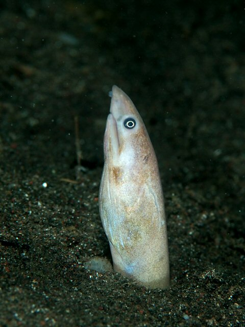 ゴマウミヘビ Apterichtus moseri